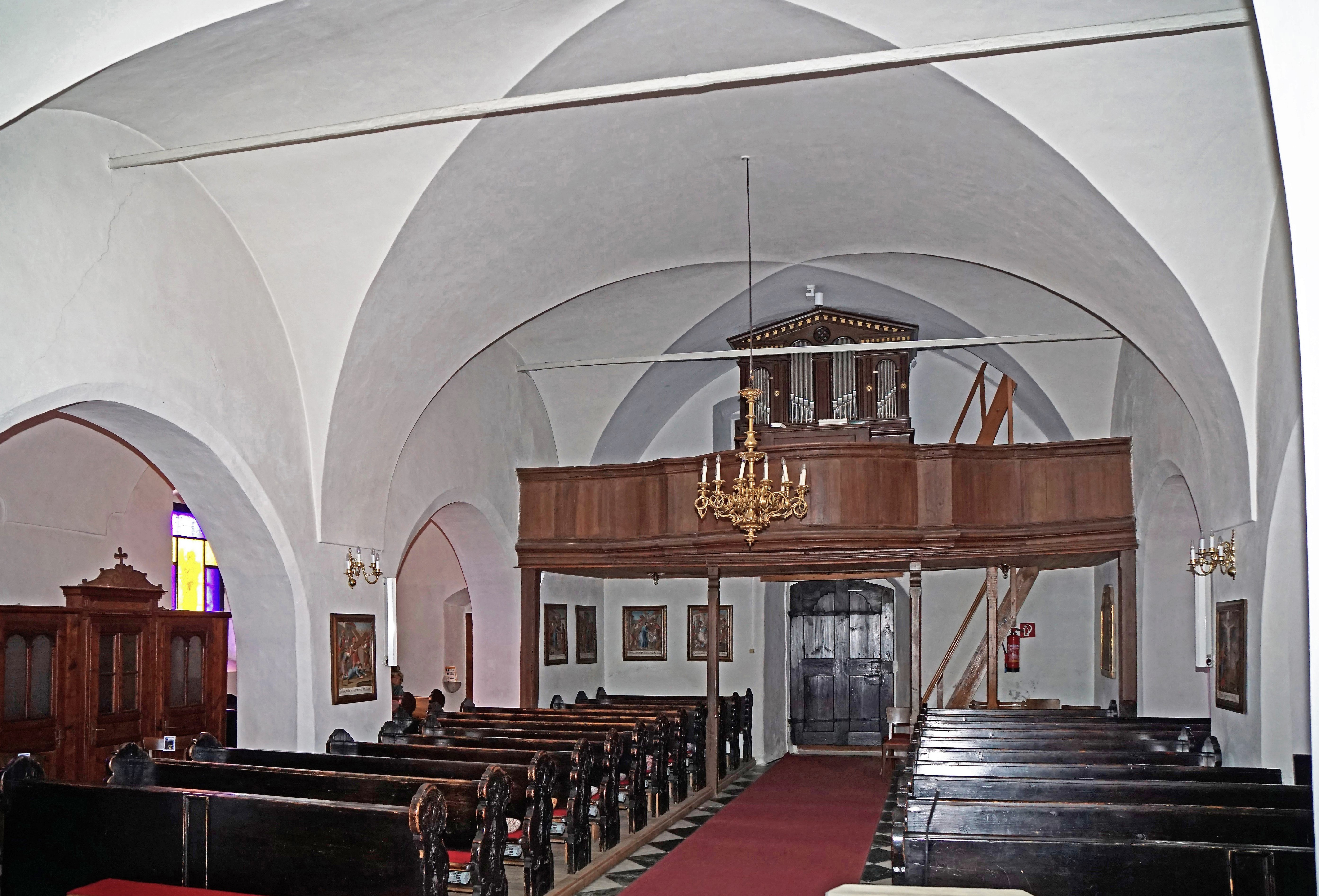 Kath. Pfarrkirche St. Stefan (Finkenstein am Faaker See), Innenansicht zur Orgelempore